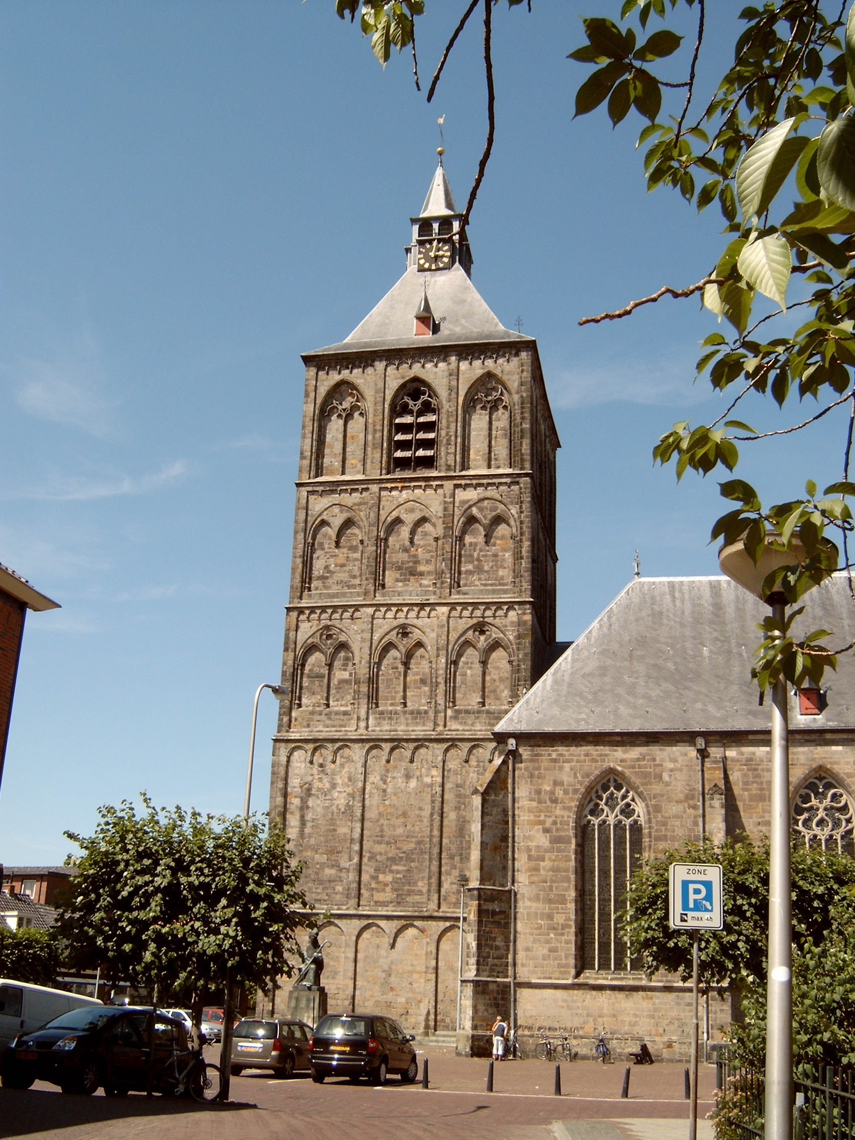 Oldenzaal, Sint Plechelmusbasiliek